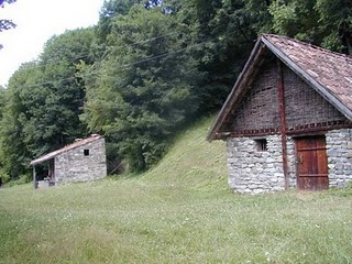 სოფელი ჩარგალი ფშავში